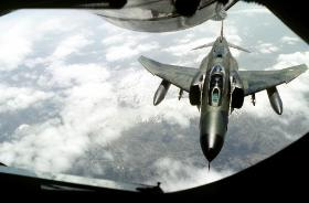 F4 der Türkischen Luftwaffe wird in der Luft betankt.